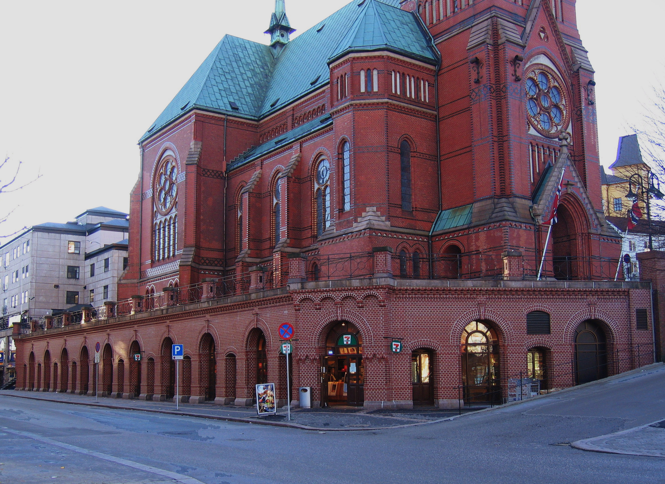 Kirkebasaren i Arendal, under Trefoldighetskirken